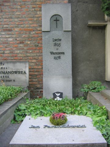 Jan Parandowski's monument (Powązki Cemetery)